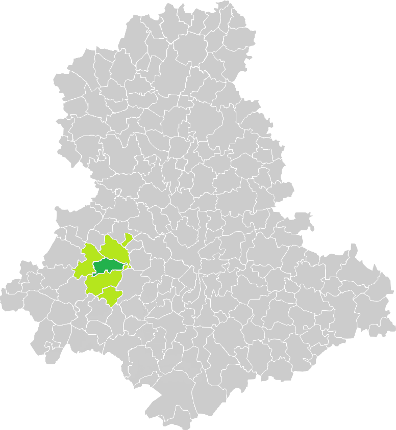 Carte de situation de la commune de Saint-Cyr (en vert foncé) dans le votre Canton (en vert clair) sur une carte des communes de la Haute-Vienne